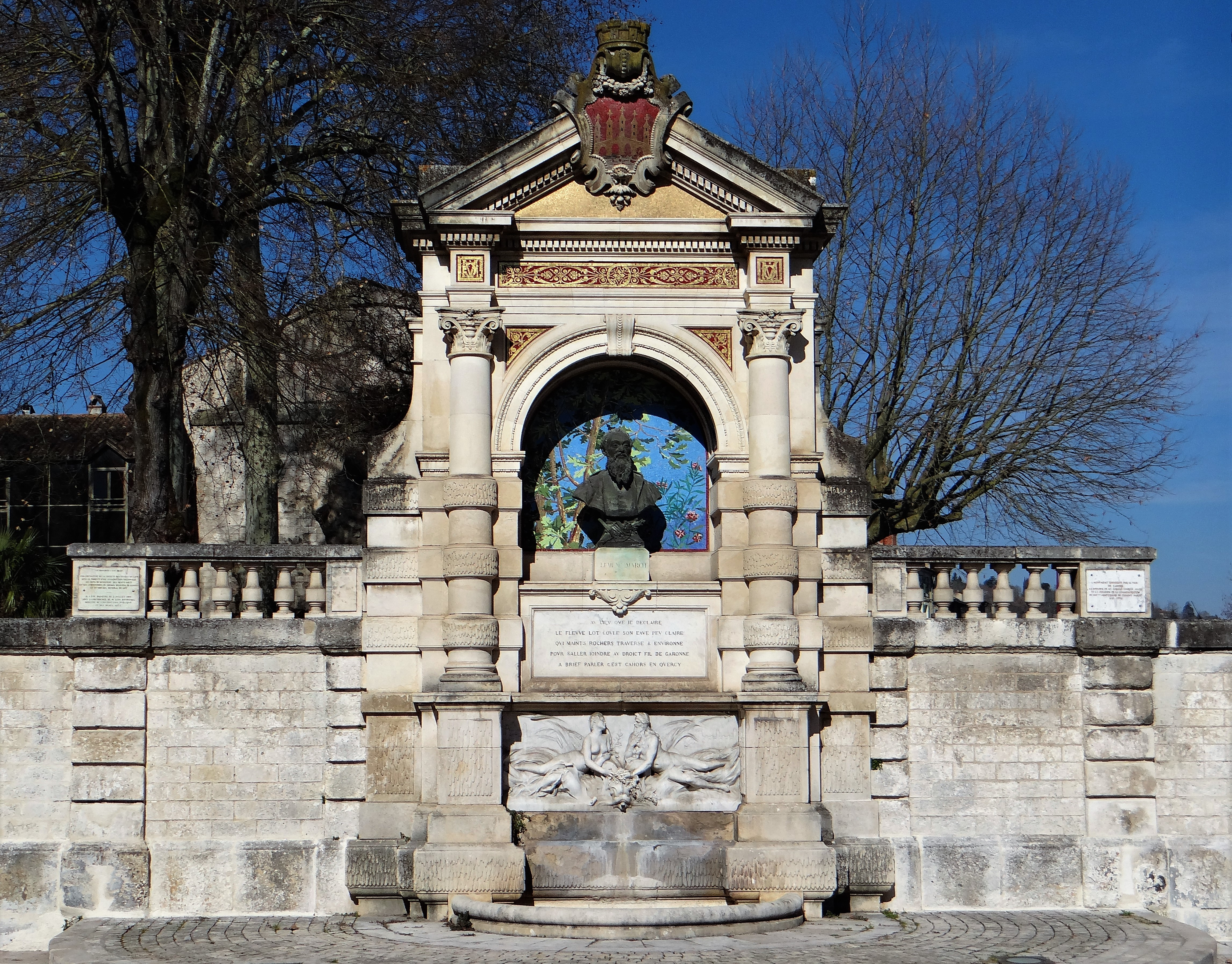 Cahors - Fontaine Clément Marot